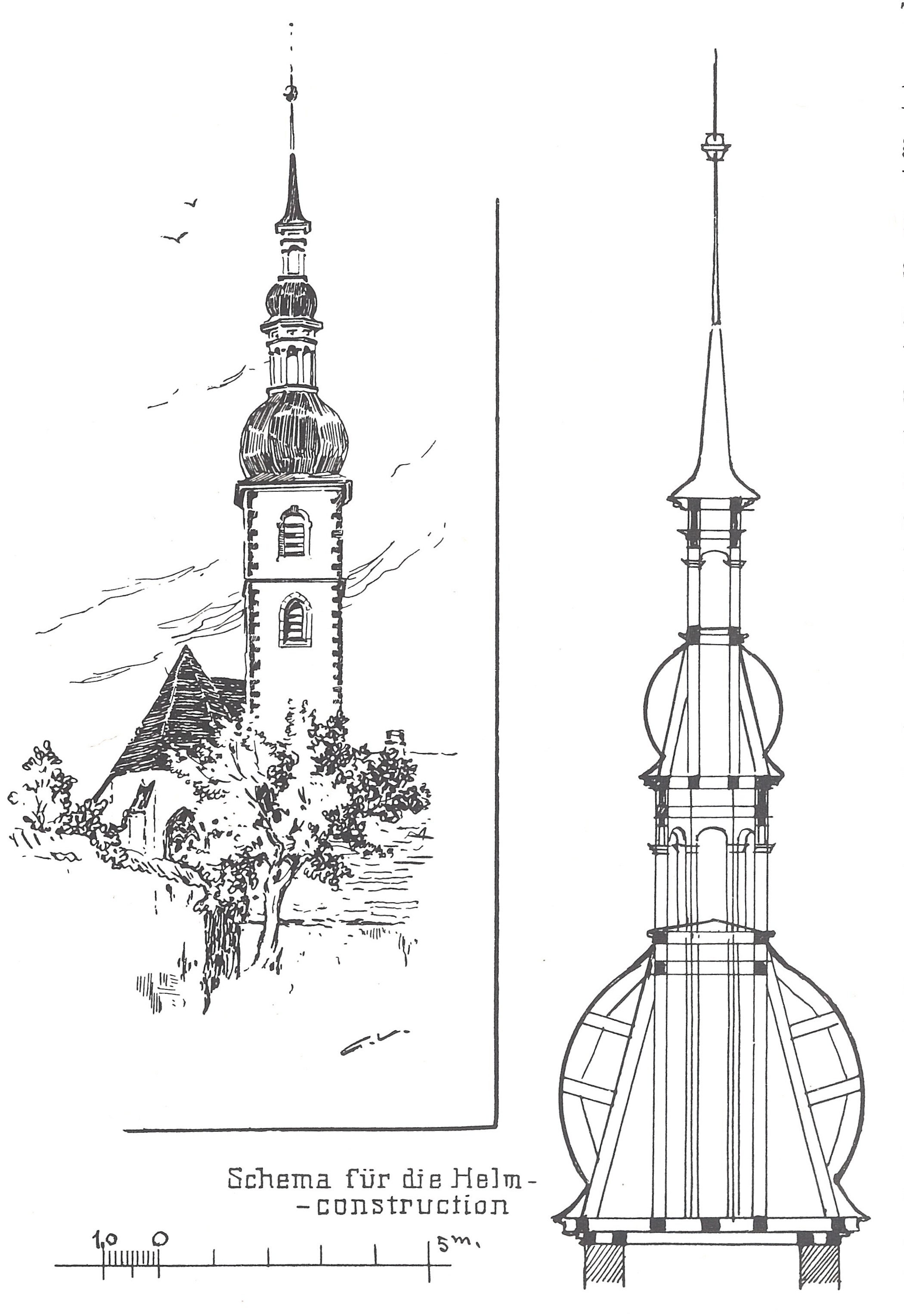 Karlinger, Hans: Die Kunstdenkmäler. S. 12.